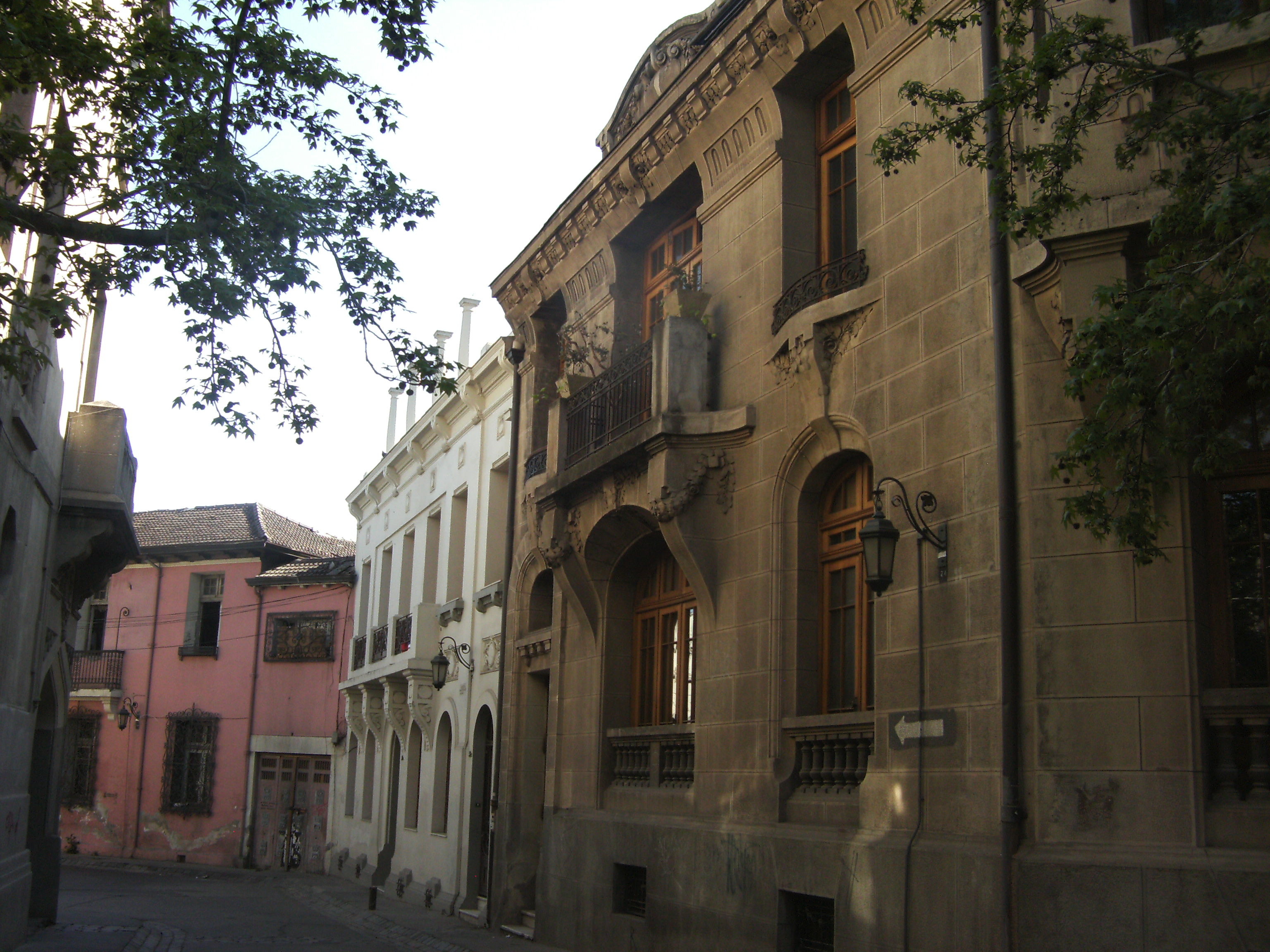 Sector calle Enrique concha y Toro en Santiago de Chile This is a photo of a national monument in Chile: 413